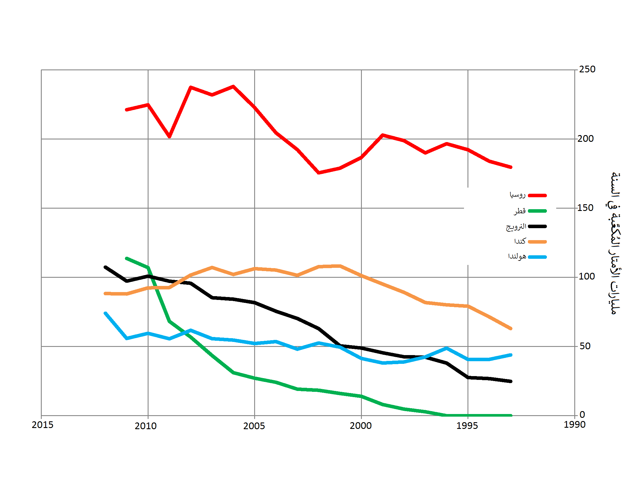 أكبر خمس دُول مُصدِّرة لِلغاز الطبيعي.